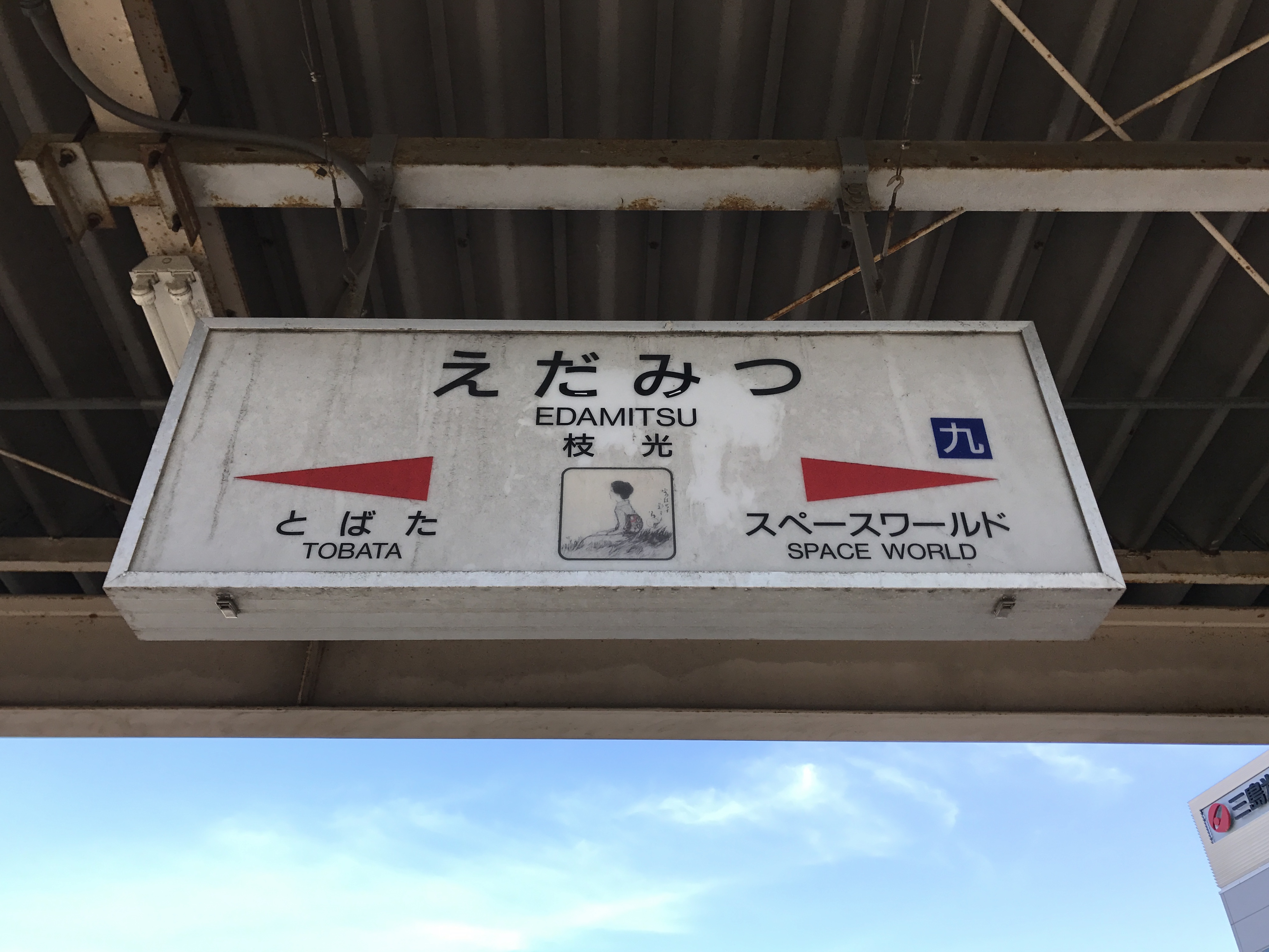 枝光駅の駅名標。イラストは竹久夢二の美人画